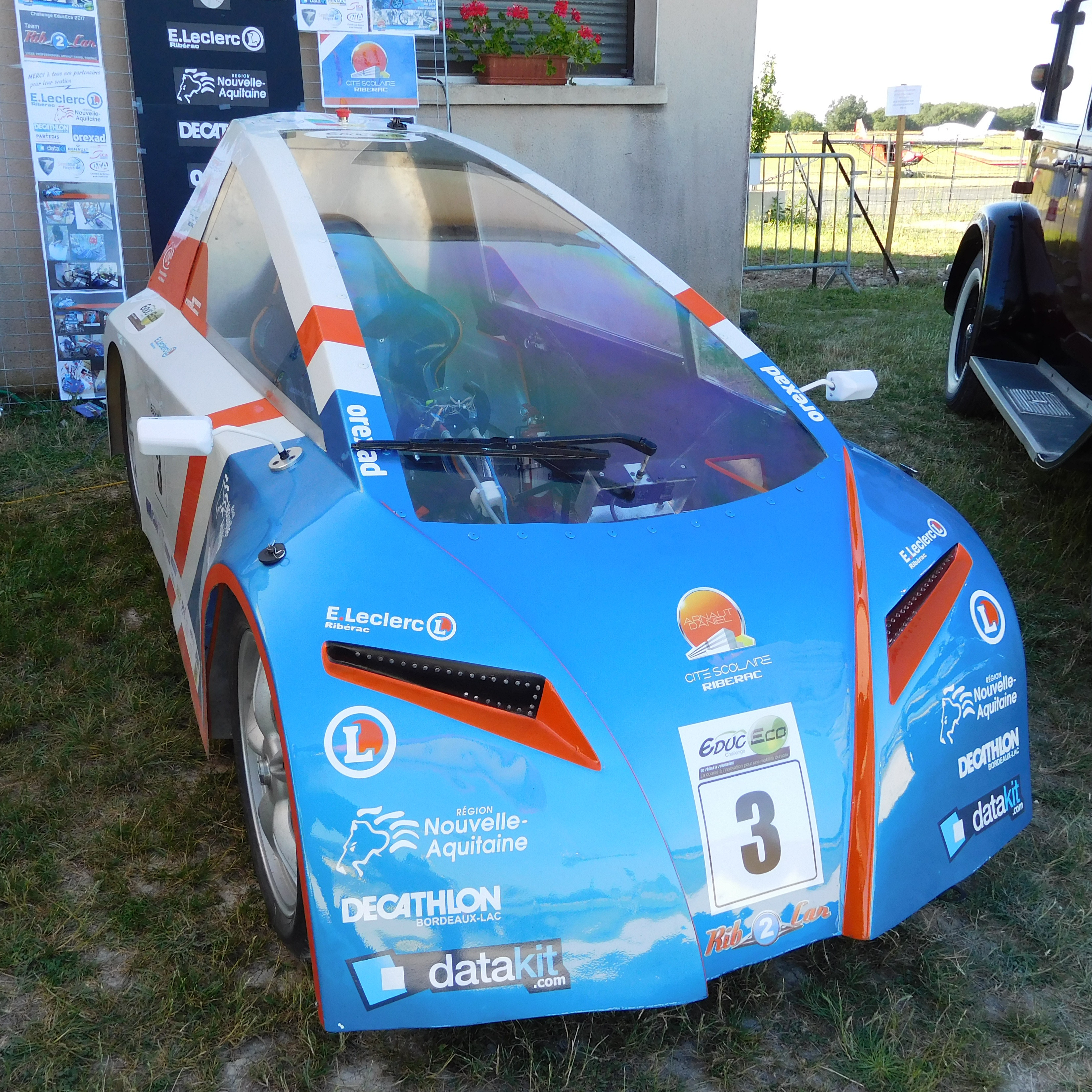 Rib’Car 2 (aussi appelé RibCar2) de l'équipe Dordogne : véhicule électrique écocitadin (économe en énergie), projet porté par le lycée professionnel Arnaut Daniel de Ribérac (Dordogne, France). Lors du Challenge EducEco 2017 Valenciennes métropole, ce prototype a remporté six prix dont le 1er prix de performance de France (2e place au niveau européen) de la catégorie Écocitadin électrique, avec une consommation de 612 kJ, soit une autonomie équivalente à 657 km pour un litre de SP95.